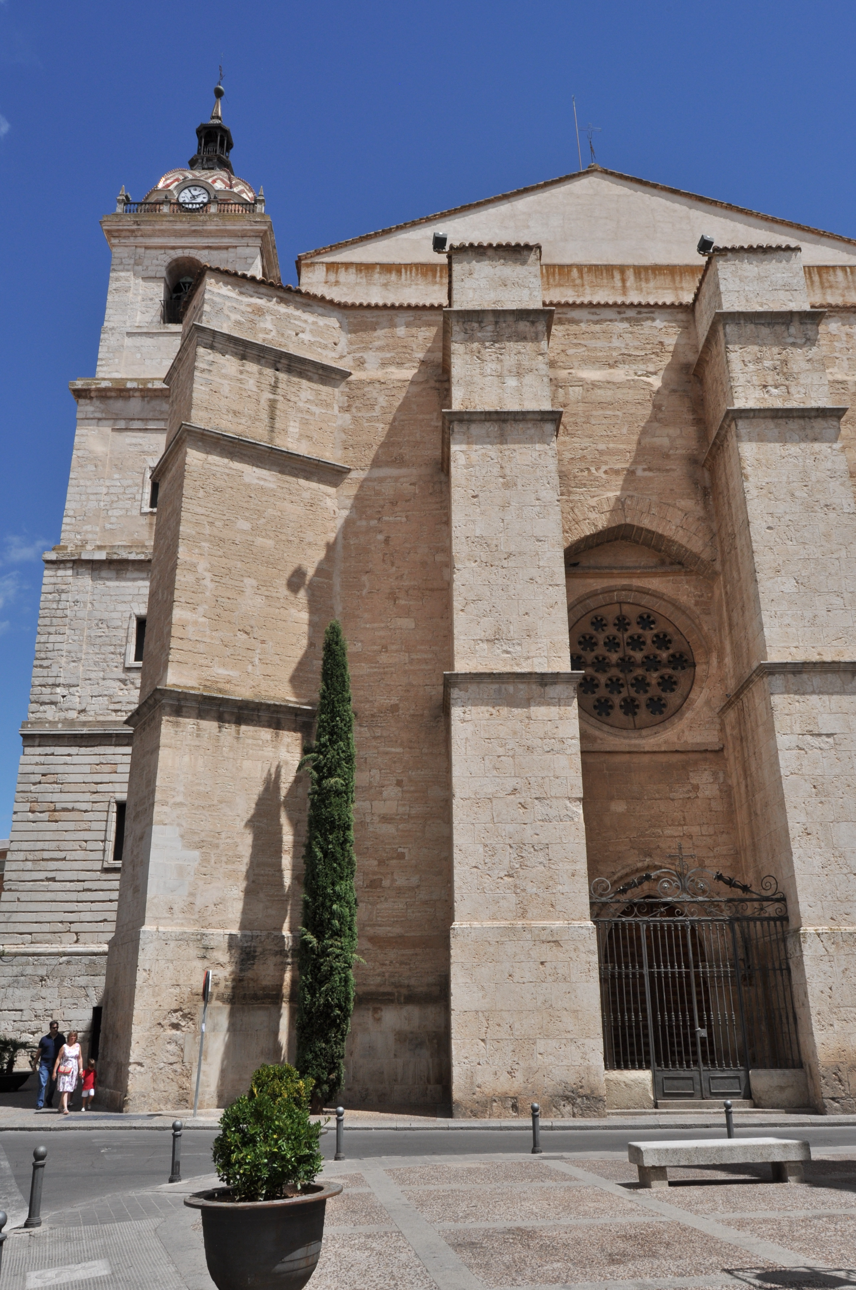 Ciudad Real Capital - 045